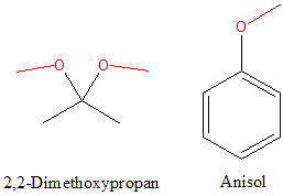 Beispiele Alkoxy-Gruppe